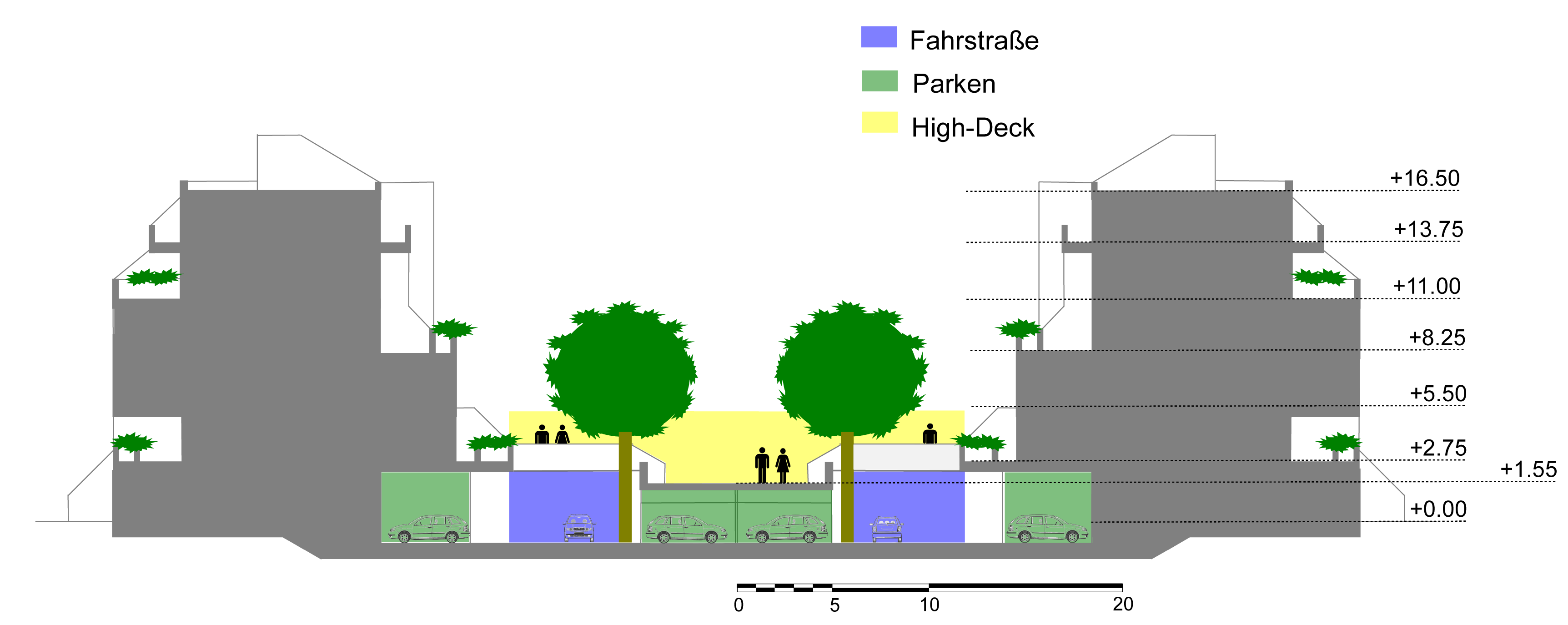 Schematischer Schnitt durch den Entwurf der Architekten Oefelein/Freund für die High-Deck-Siedlung in Berlin zur Verdeutlichung des Konzepts